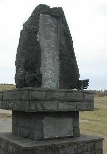 Marado